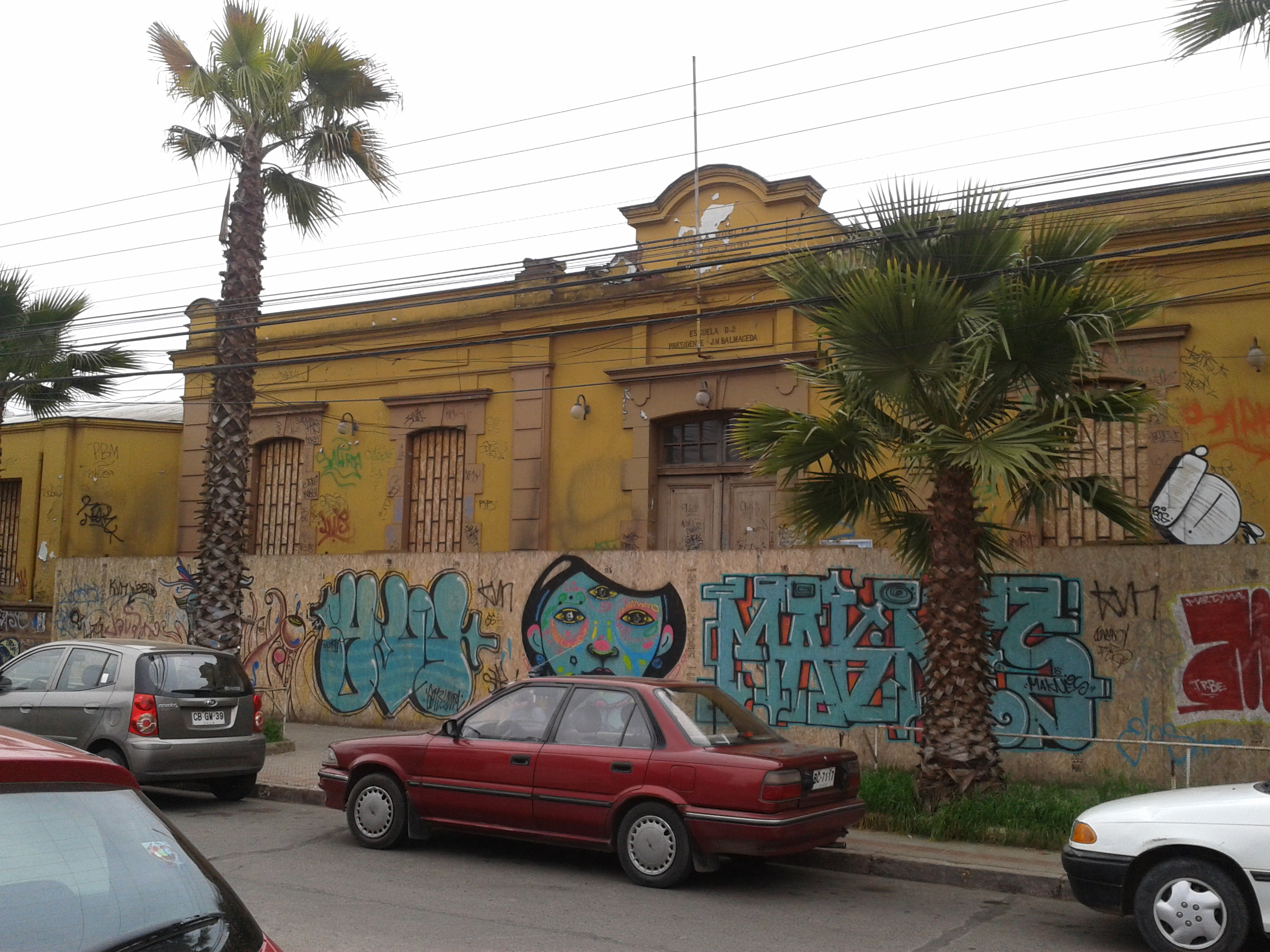 Escuela D-2 Presidente José Manuel Balmaceda This is a photo of a national monument in Chile: 1856